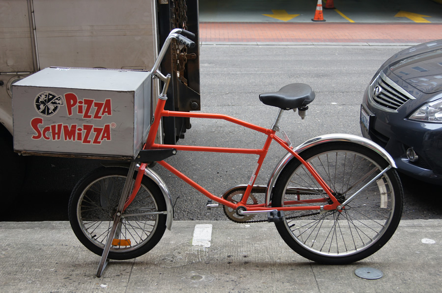 Pizza Schmizza's delivery bike.